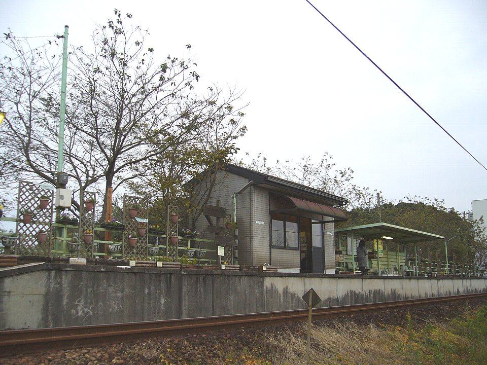 天竜浜名湖鉄道いこいの広場駅